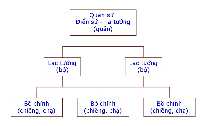 Sơ đồ bộ máy hành chính 2 quận Giao Chỉ và Cửu Chân thời nhà Triệu nước Nam Việt. Triệu Đà từng được làm quan nhà Tần, vì vậy ảnh hưởng của bộ máy hành chính nhà Tần với ông là không nhỏ. Bởi lẽ đó mà Đà đã áp dụng một cách linh hoạt bộ máy nhà nước sơ khai này vào việc cai trị nước Nam Việt. Nhưng riêng với hai quận Giao Chỉ và Cửu Chân, ông chỉ đặt một quan Điển sứ để coi việc chính trị, hành chính; một quan Tả tướng trông coi việc quân sự. Còn các quý tộc bản xứ vẫn giữ được thái ấp và trị dân như cũ. Dân số ở hai quận này vào thời nhà Triệu theo thống kê là khoảng 40 vạn dân. Con cháu An Dương Vương ở đất Tây Vu, trung tâm là Cổ Loa thuộc quận Giao Chỉ vẫn được xưng vương (Tây Vu Vương) nhưng dưới cương vị chư hầu cho Nam Việt. Họ được nhà Triệu biệt đãi hơn cả.